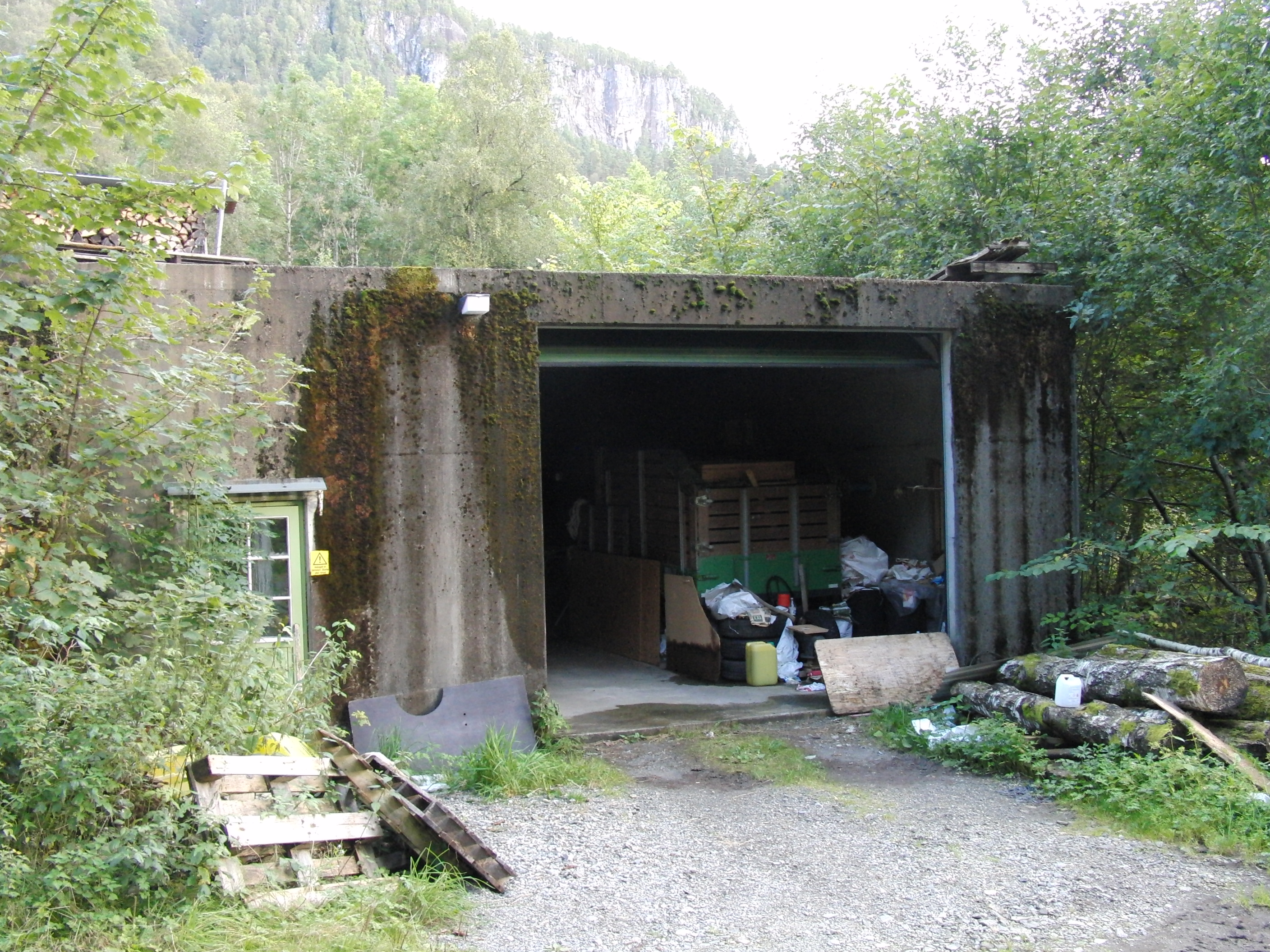 Molla kraftverk